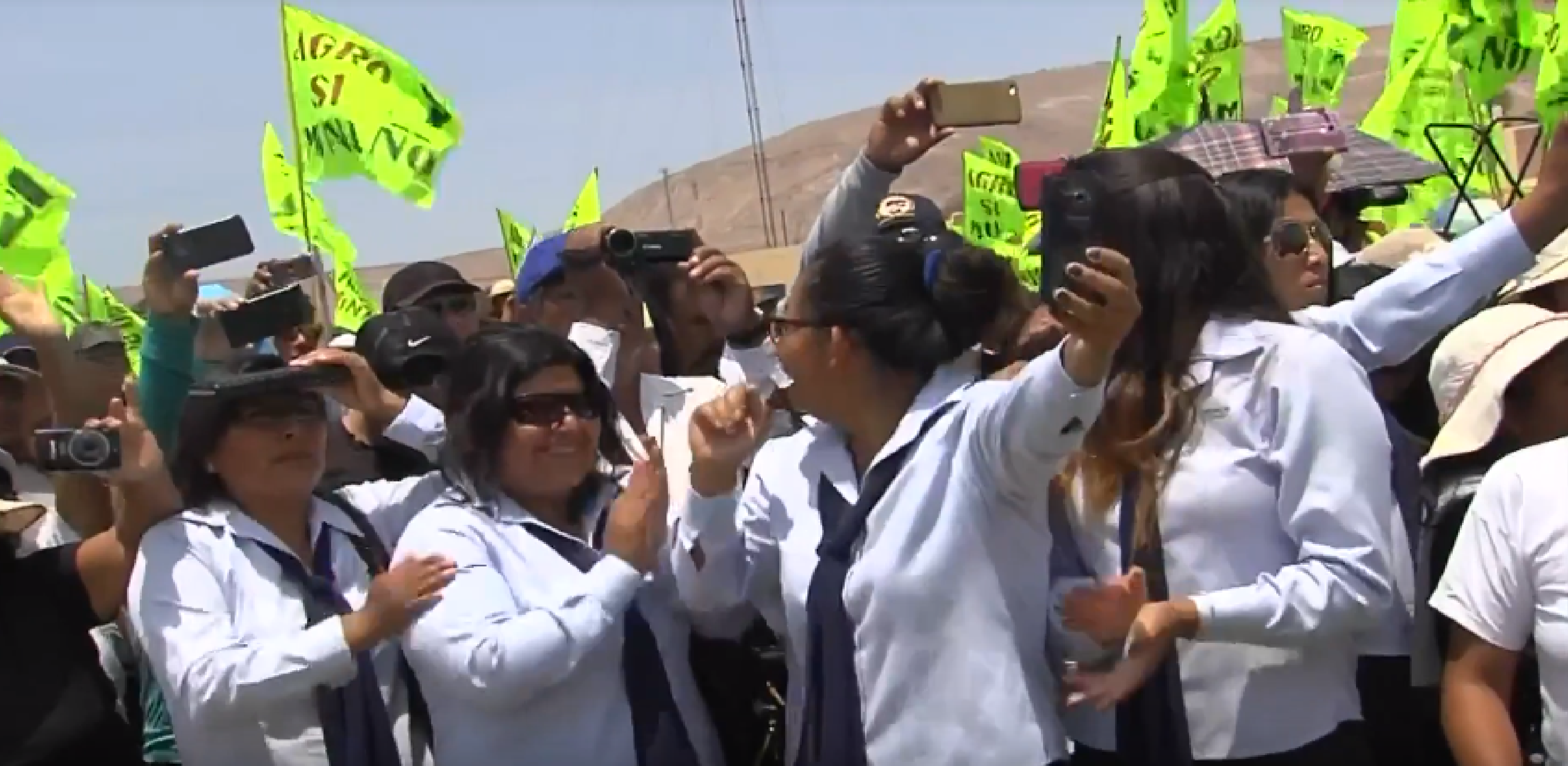 Agro si Mina no, Arequipa